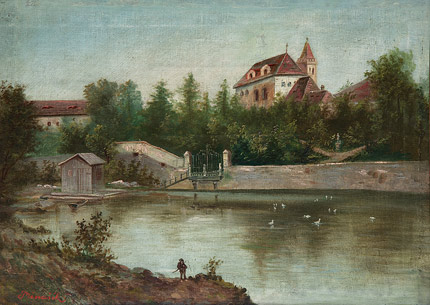 V podzámčí